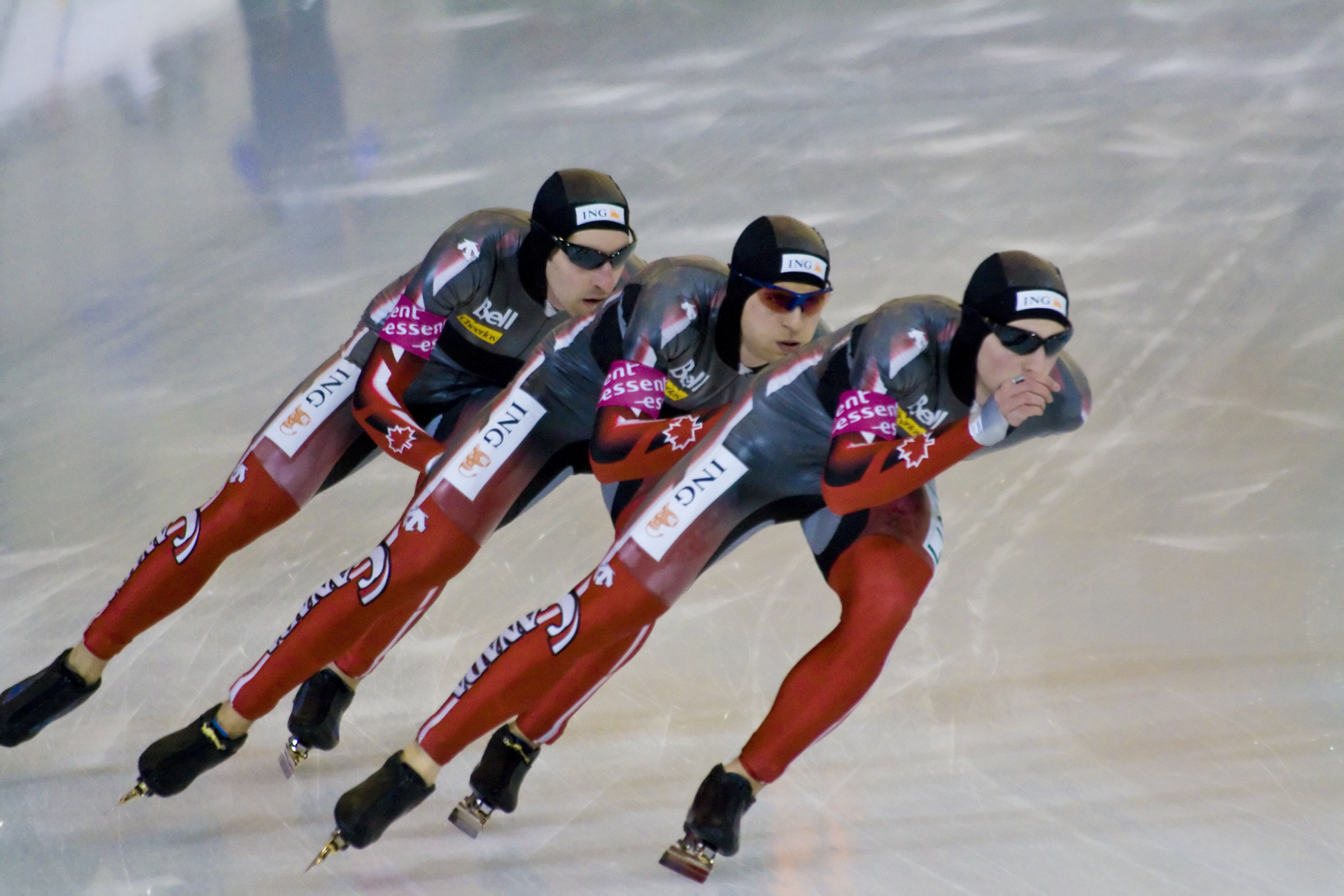 Team Canada Team Pursuit